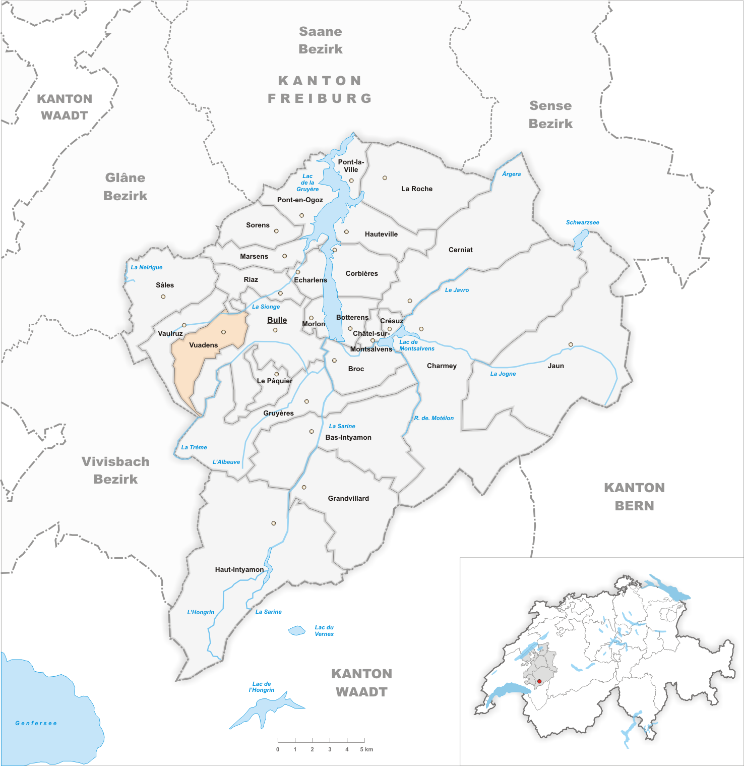 Municipality Vuadens